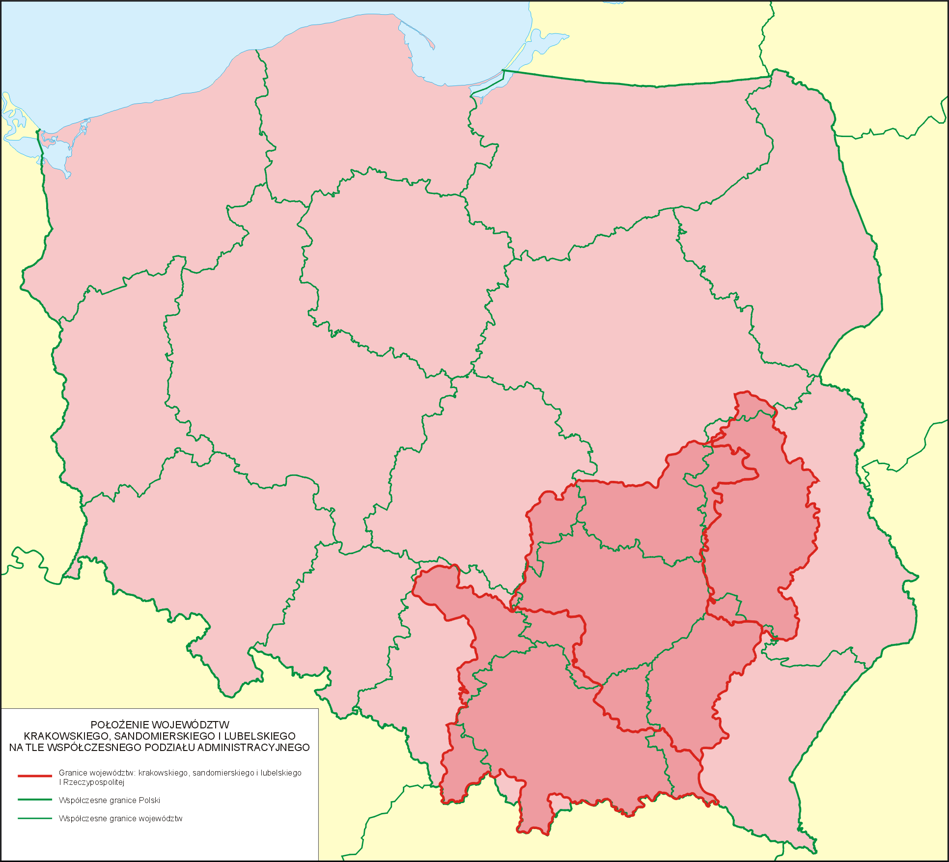 Położenie województw krakowskiego, sandomierskiego i lubelskiego I Rzeczypospolitej na tle współczesnego podziału administracyjnego